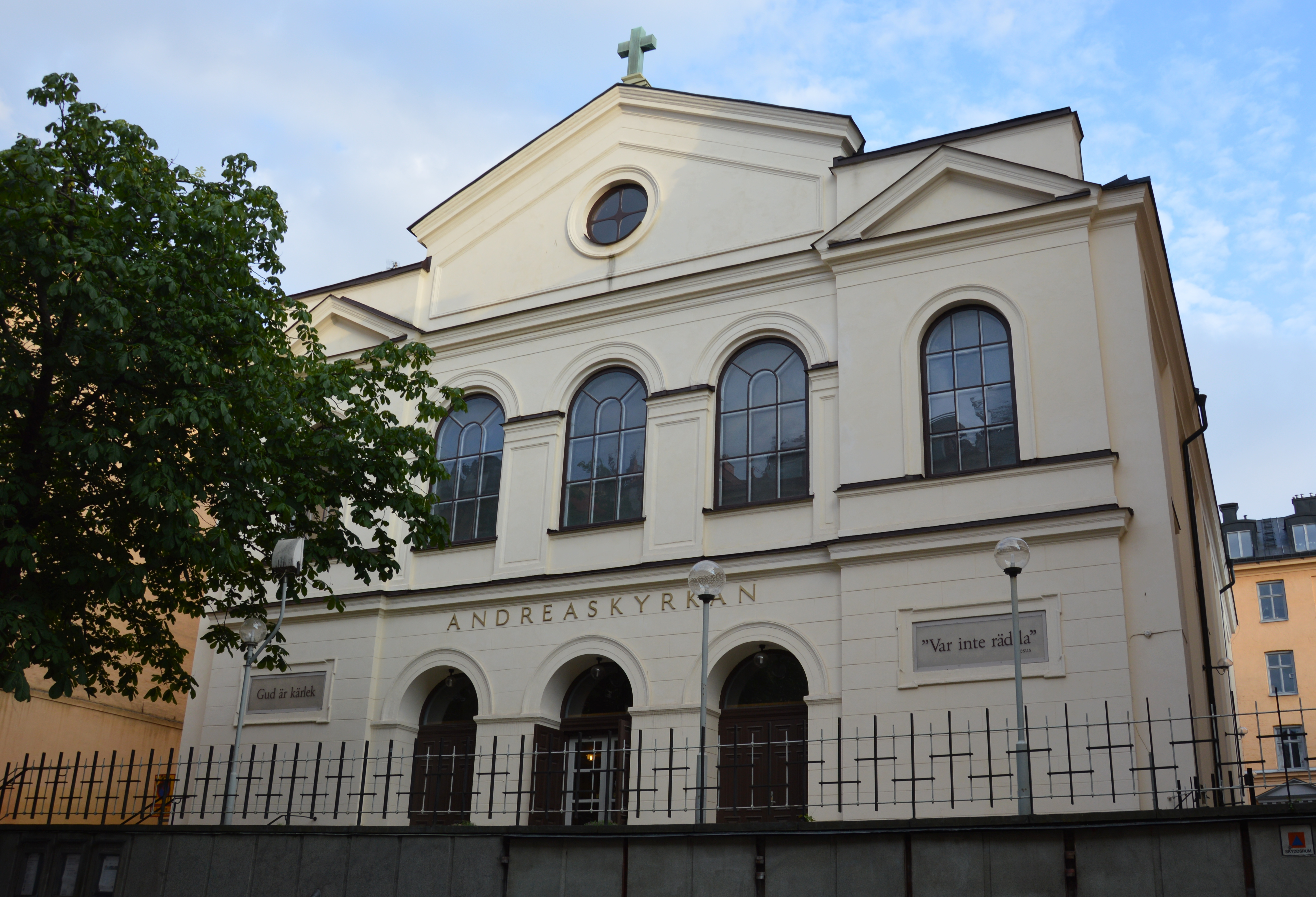 Andreaskirche in Södermalm, Stockholm